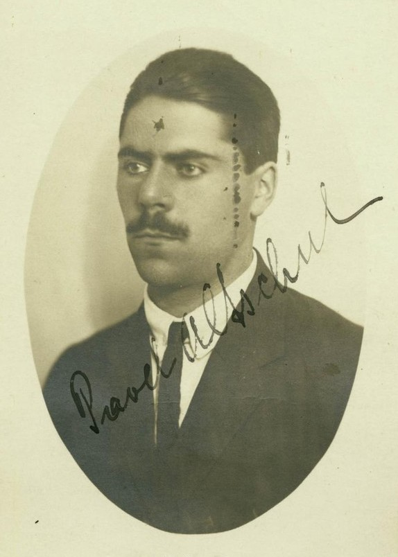 Pavel Altschul (1900 - 1944), Český novinář a politik.